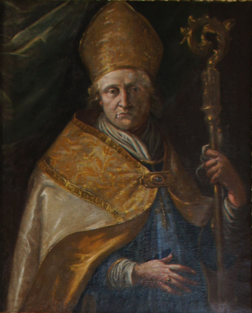 Porträtgemälde von Anno, Bischof von Freising, im Fürstengang zwischen Fürstbischöflicher Residenz und Freisinger Dom.